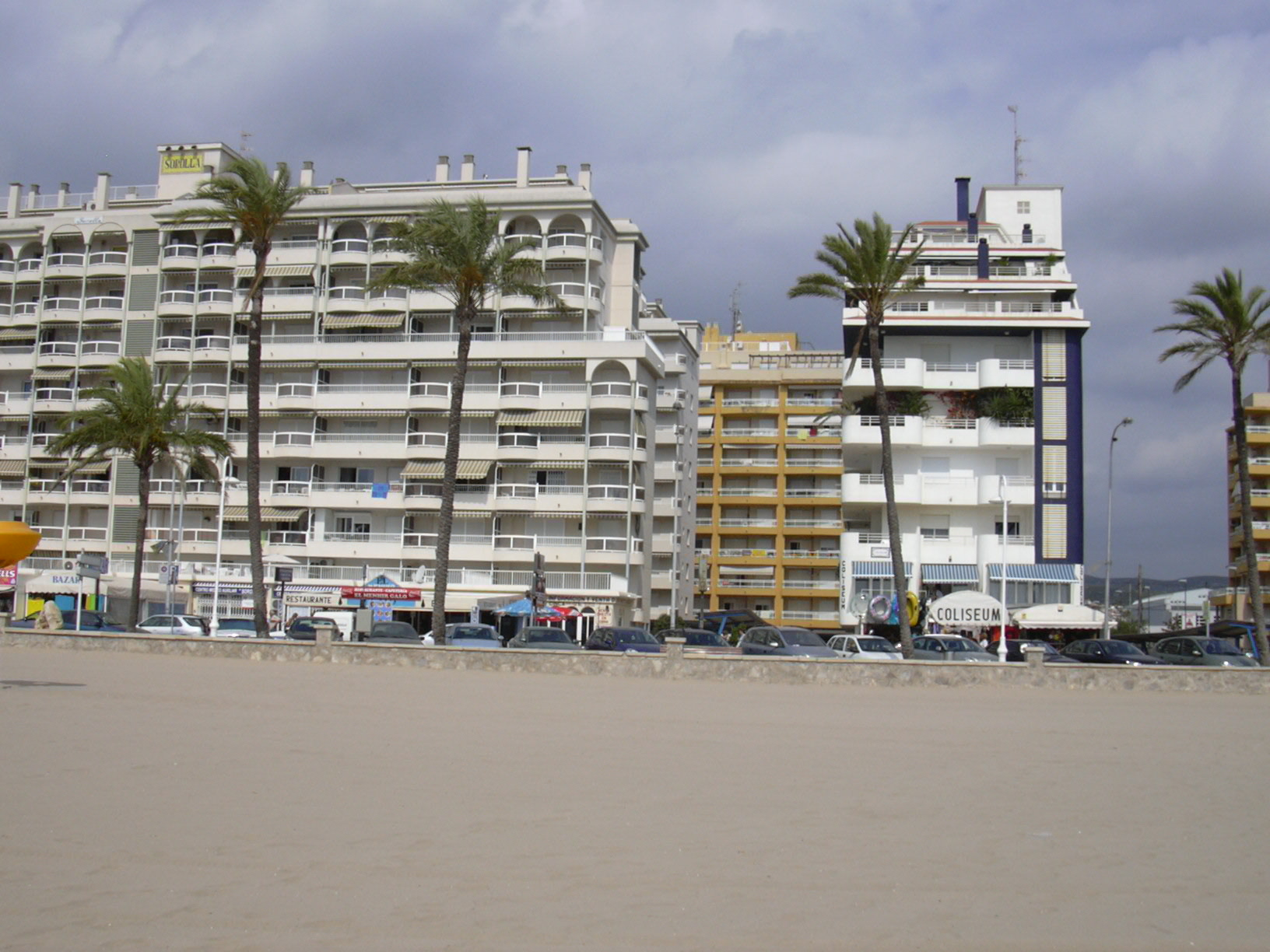 Edificios en la costa céntrica de Peñíscola, España. Buildings in the central coast of Peñíscola, Spain.